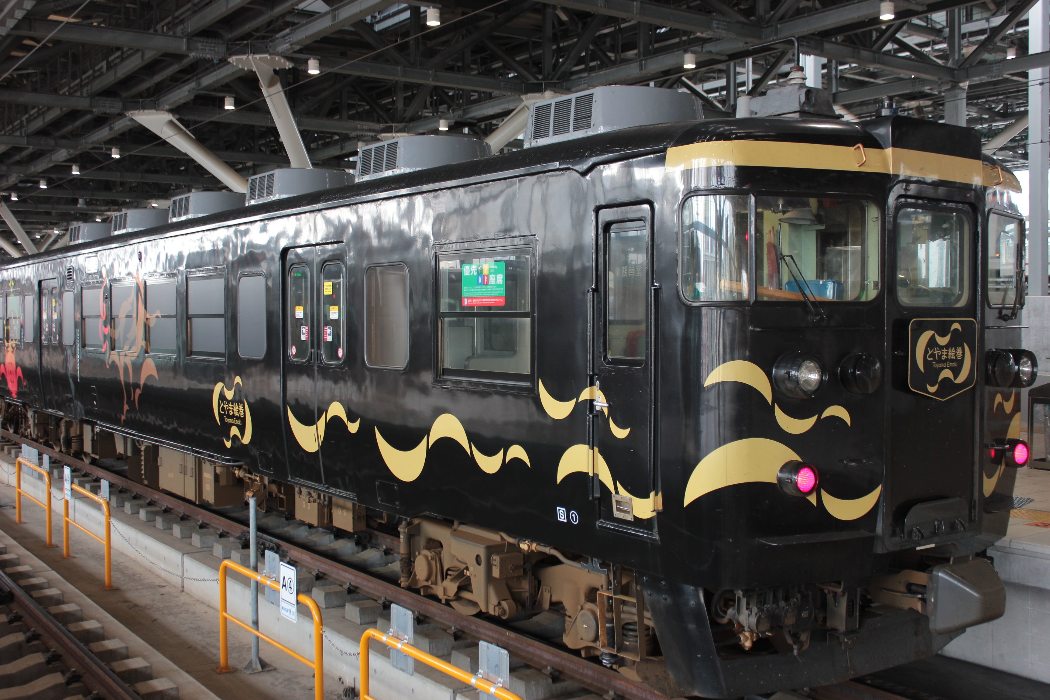 あいの風とやま鉄道の「とやま絵巻」 Canon EOS Kiss X5